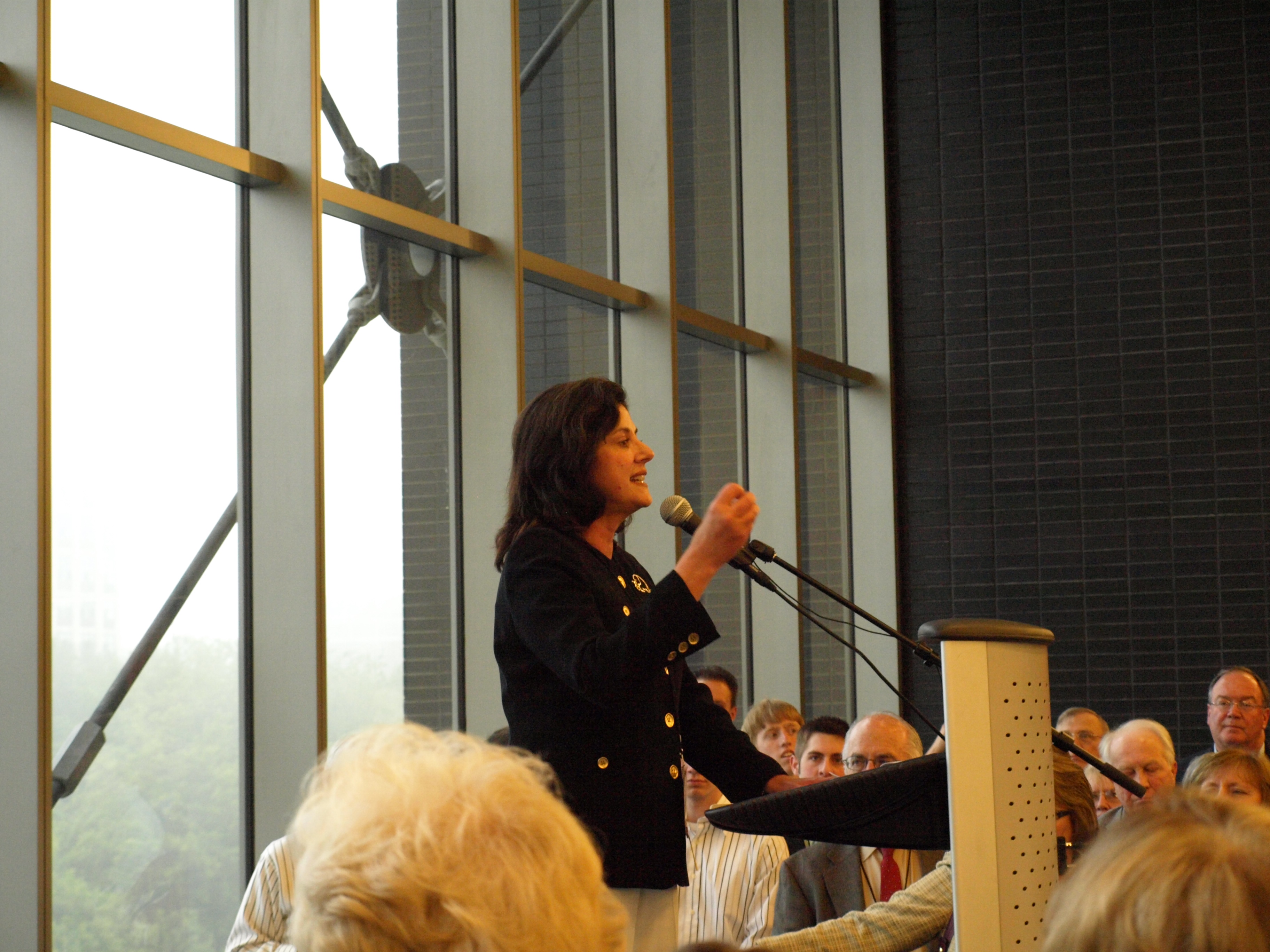 Rep. Vukmir